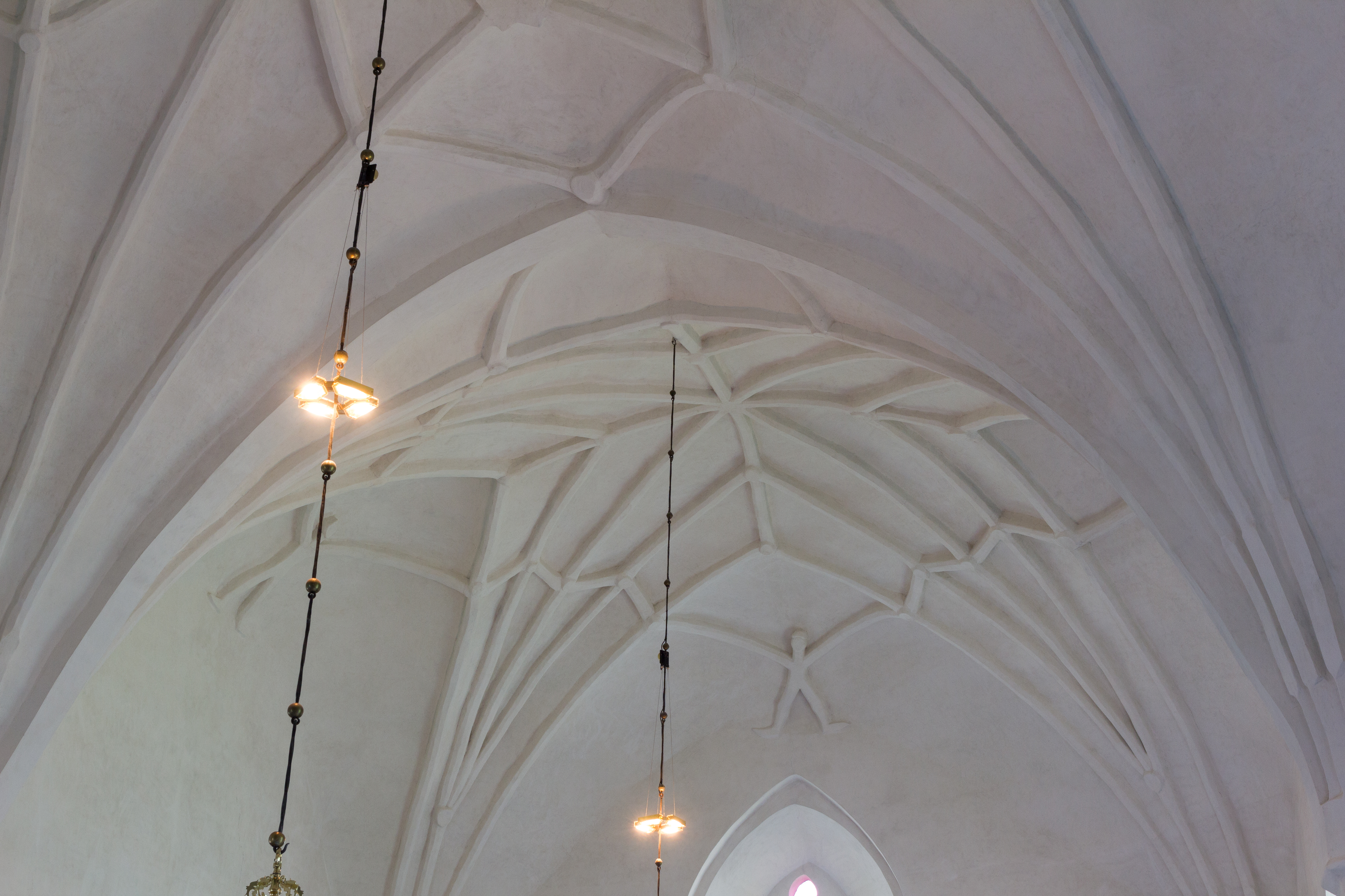 Takvalv (samt övre del av korfönster), Möklinta kyrka